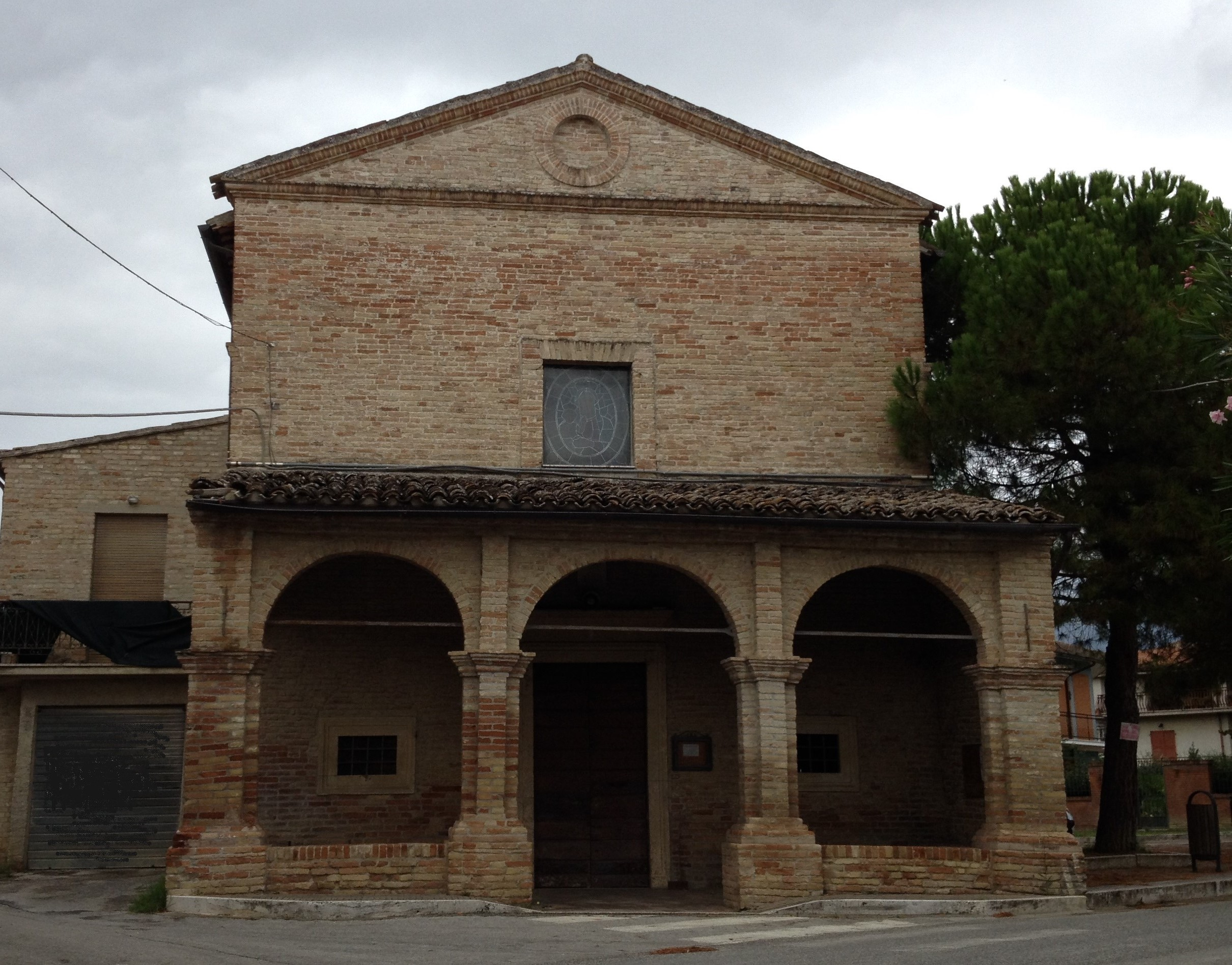 Chiesa Santuario Madonna degli Angeli di Villa Chiarini facciata